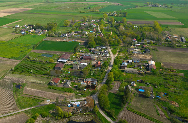 Widok z lotu ptaka.